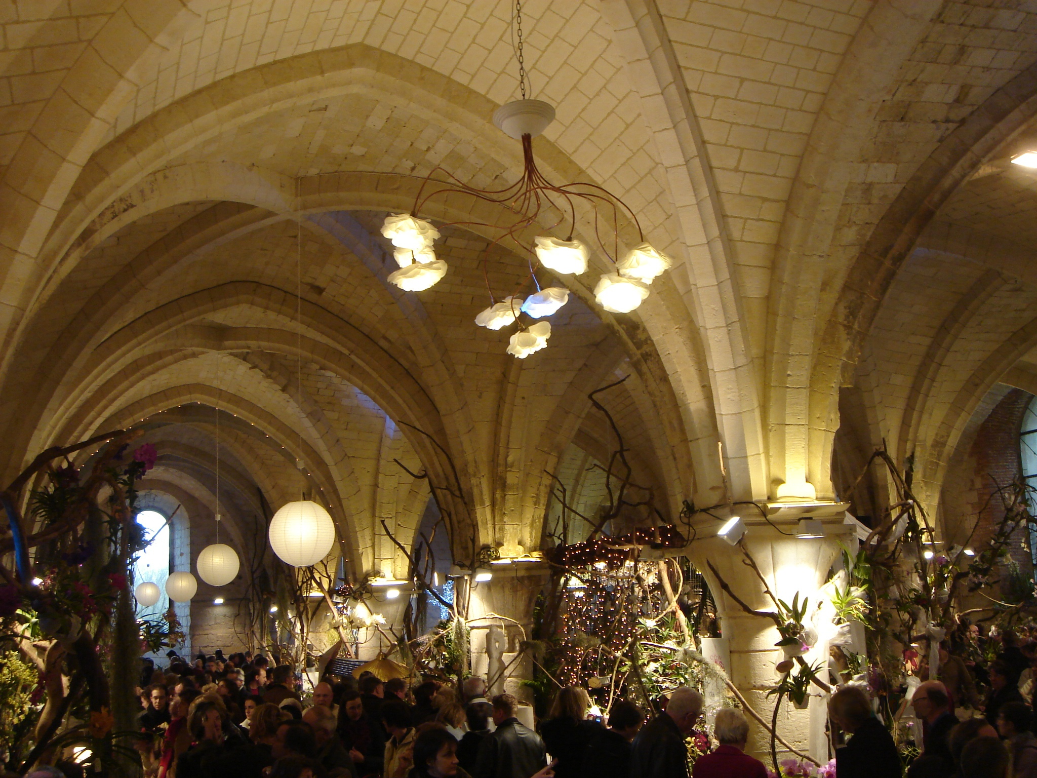 Abbaye de Vaucelles orchidées 0007